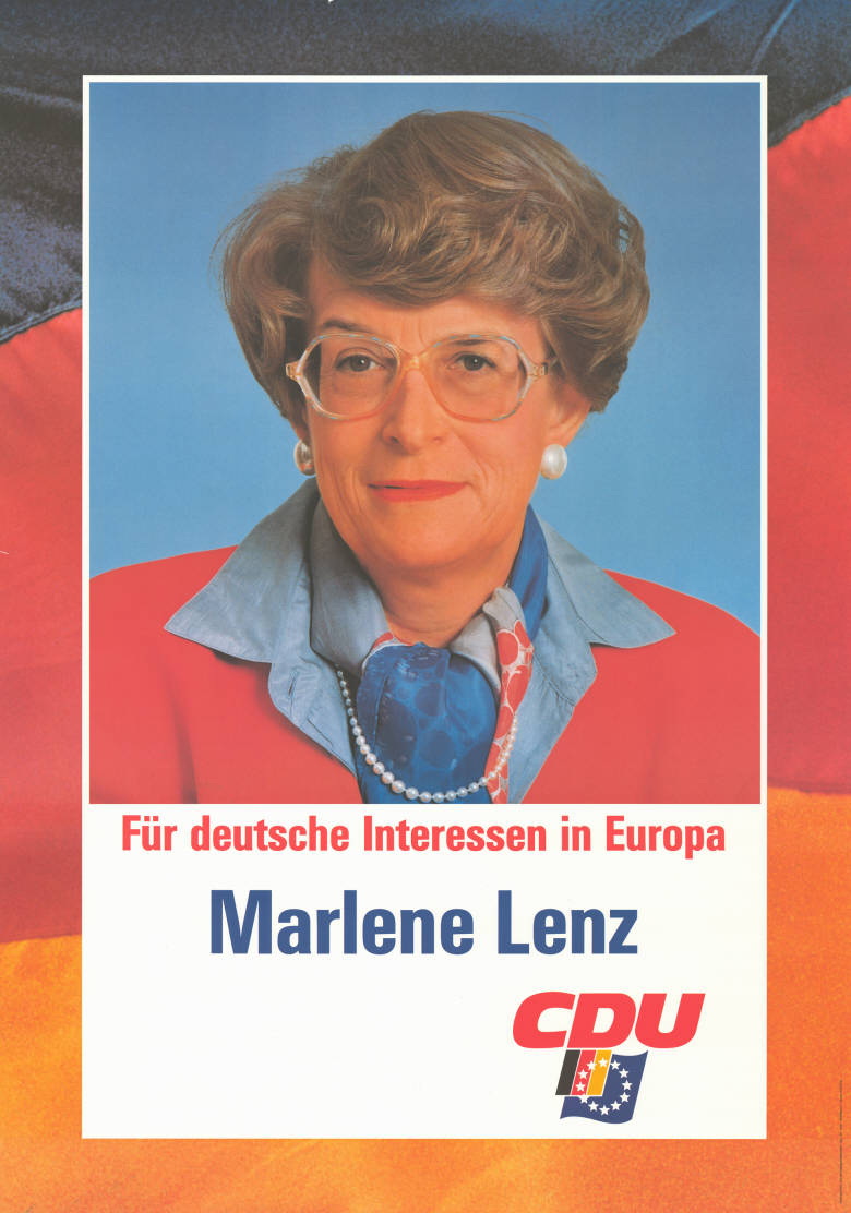 Für deutsche Interessen in Europa Marlene Lenz CDUAbbildung:Porträtfoto - NationalfarbenPlakatart:Kandidaten-/Personenplakat mit PorträtAuftraggeber:Verantw.: CDU-Bundesgeschäftsstelle, Abt. Öffentlichkeitsarbeit, Konrad-Adenauer-Haus, BonnDrucker_Druckart_Druckort:KVD, KölnObjekt-Signatur:10-030 : 207Bestand:Europawahlplakate (10-030)GliederungBestand10-18:Europawahlplakate (10-030) » CDULizenz:KAS/ACDP 10-030 : 207 CC-BY-SA 3.0 DE